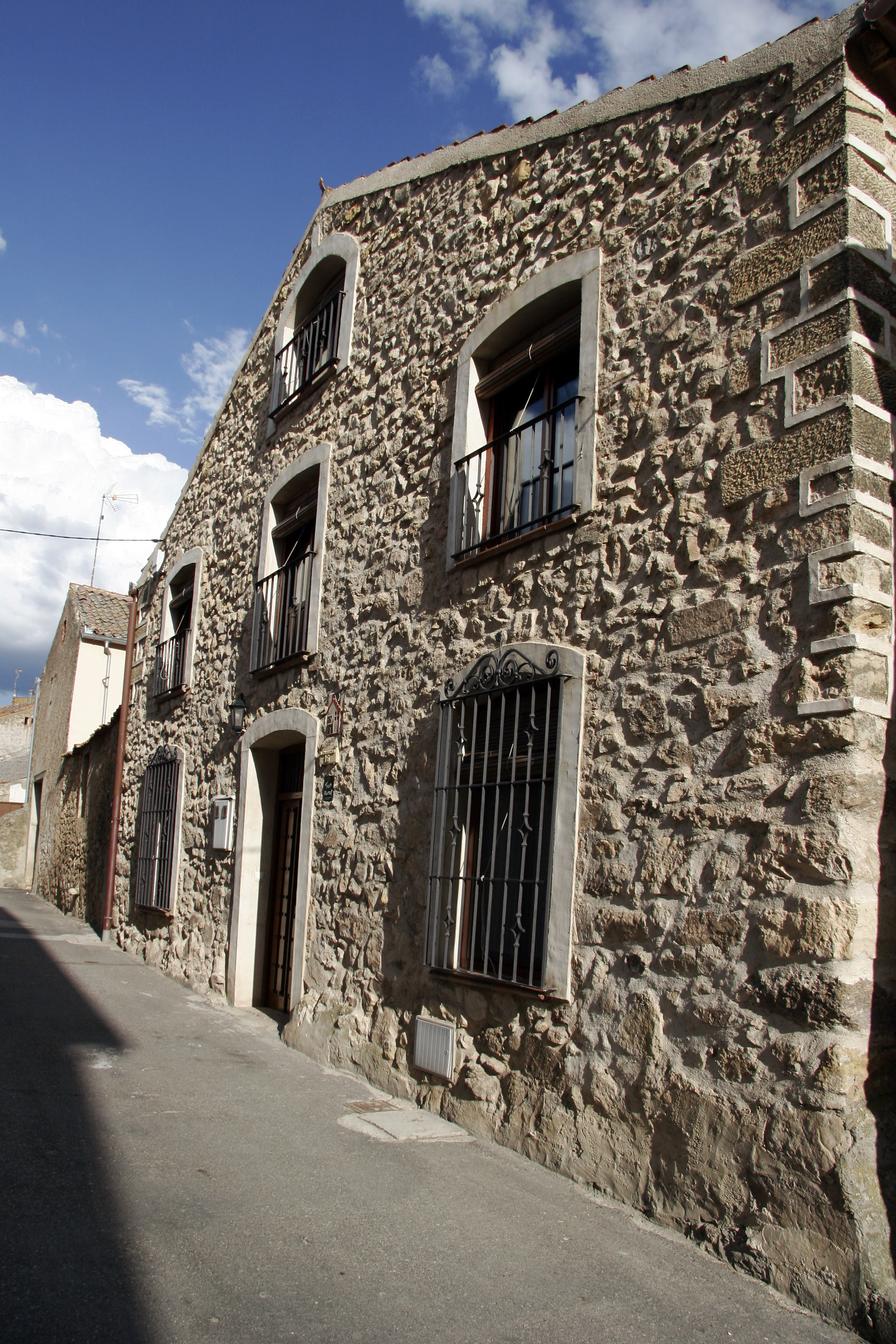 Casa rural El Choricero, en Bernuy de Porreros, Segovia, España